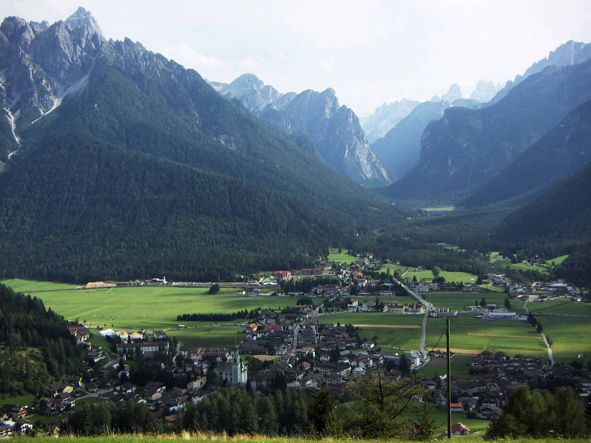 Veduta del paese di Dobbiaco, Alto Adige, Italia